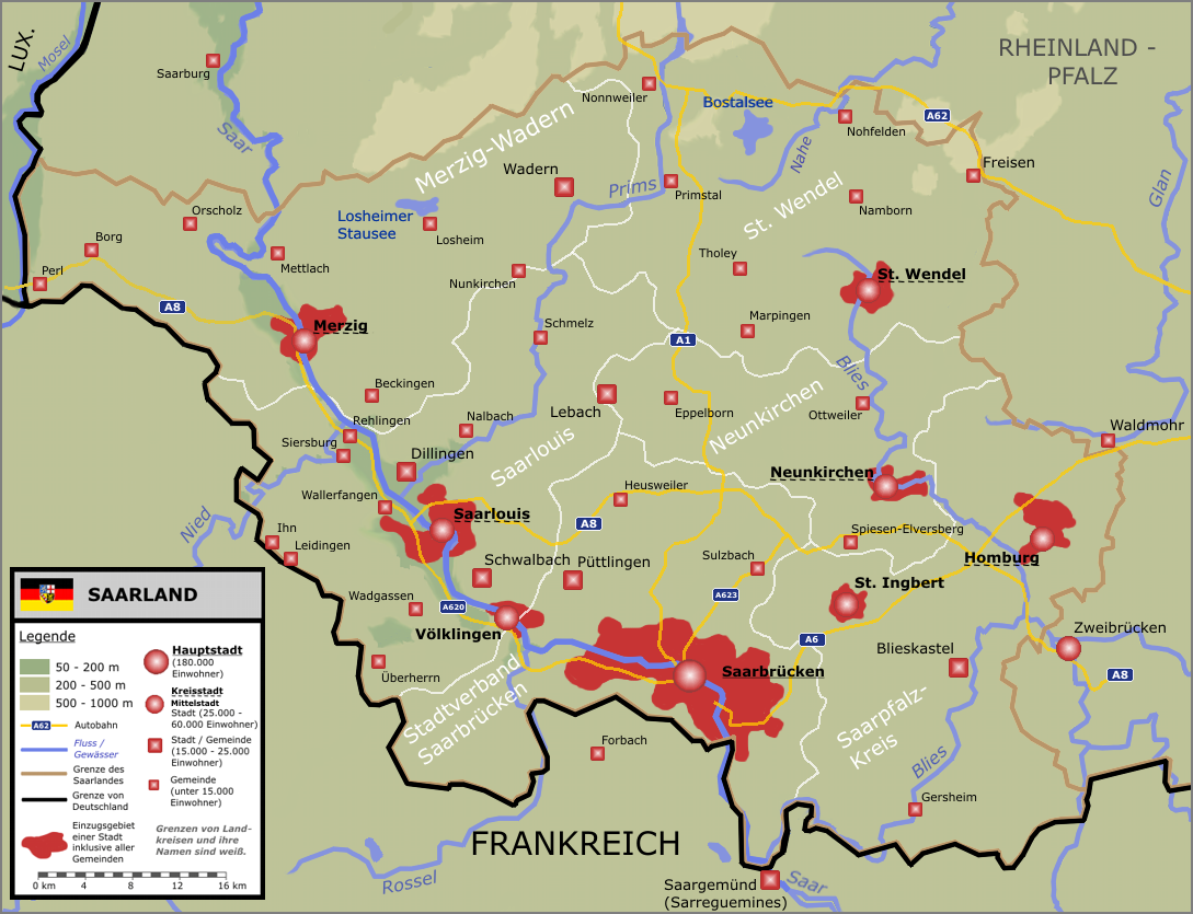 Neue Karte des Saarlandes Version: 1.8